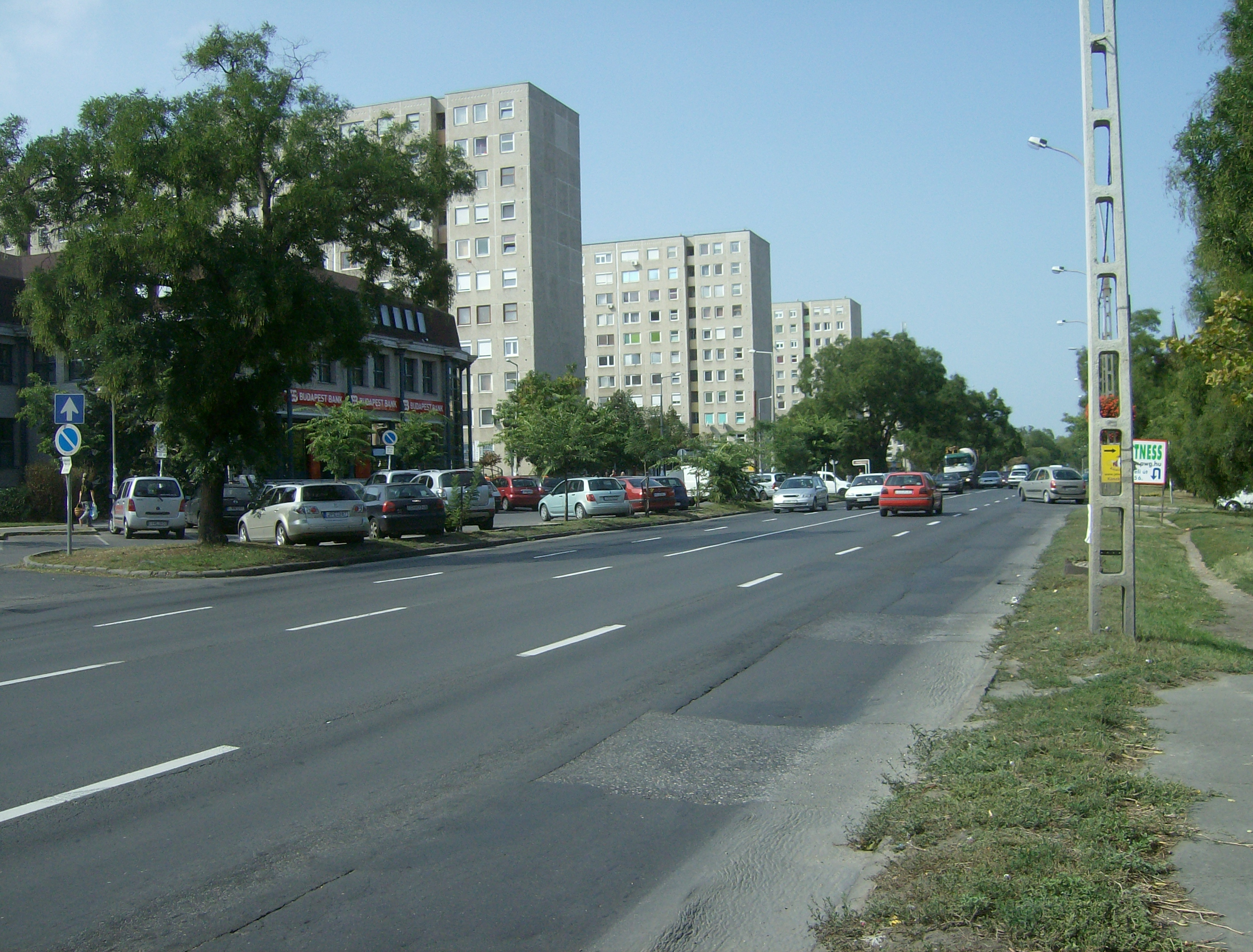 A bérházak, Pesti út